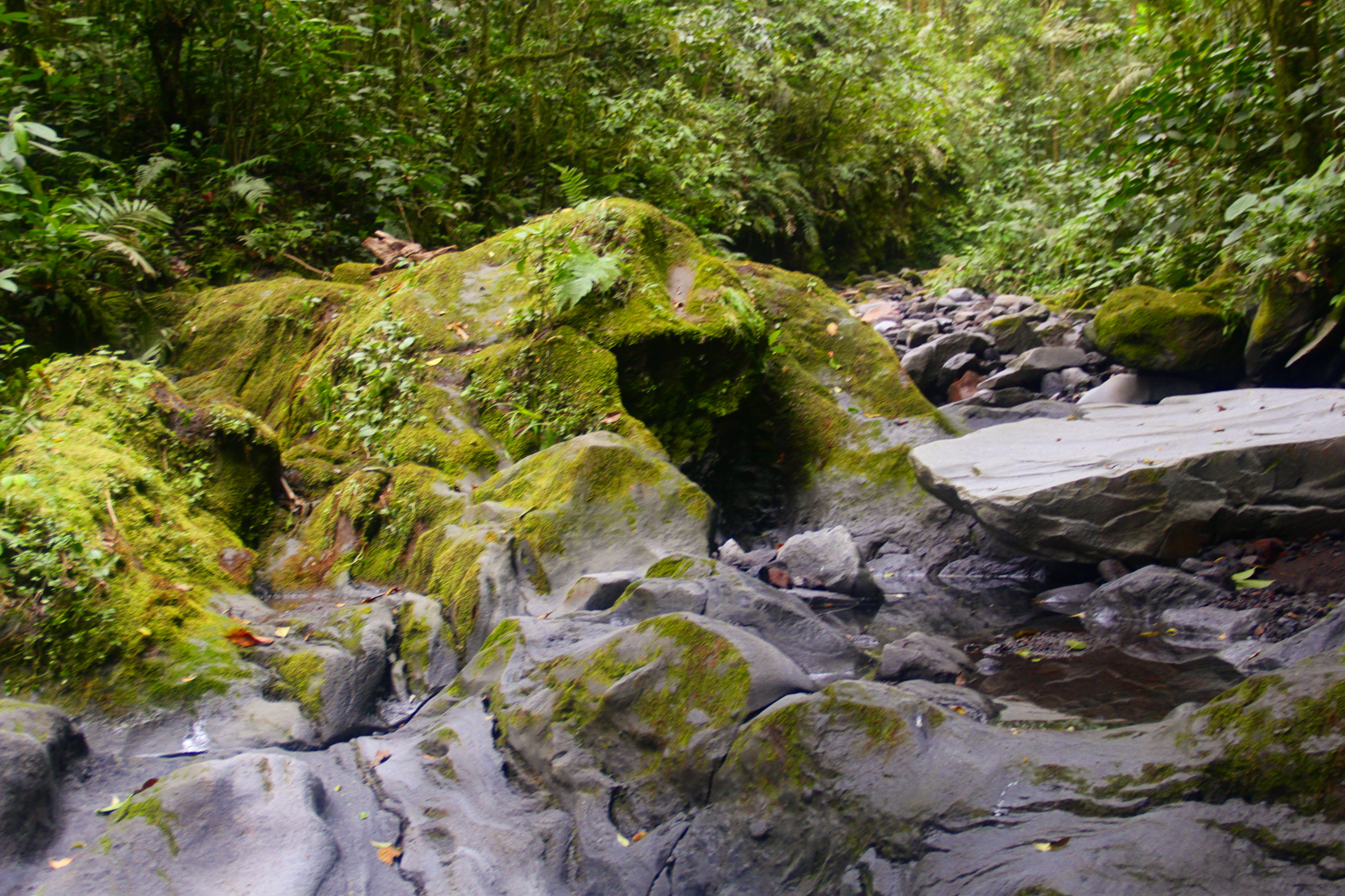 Sumber air batu lumut gunung kerinci 3805mdpl